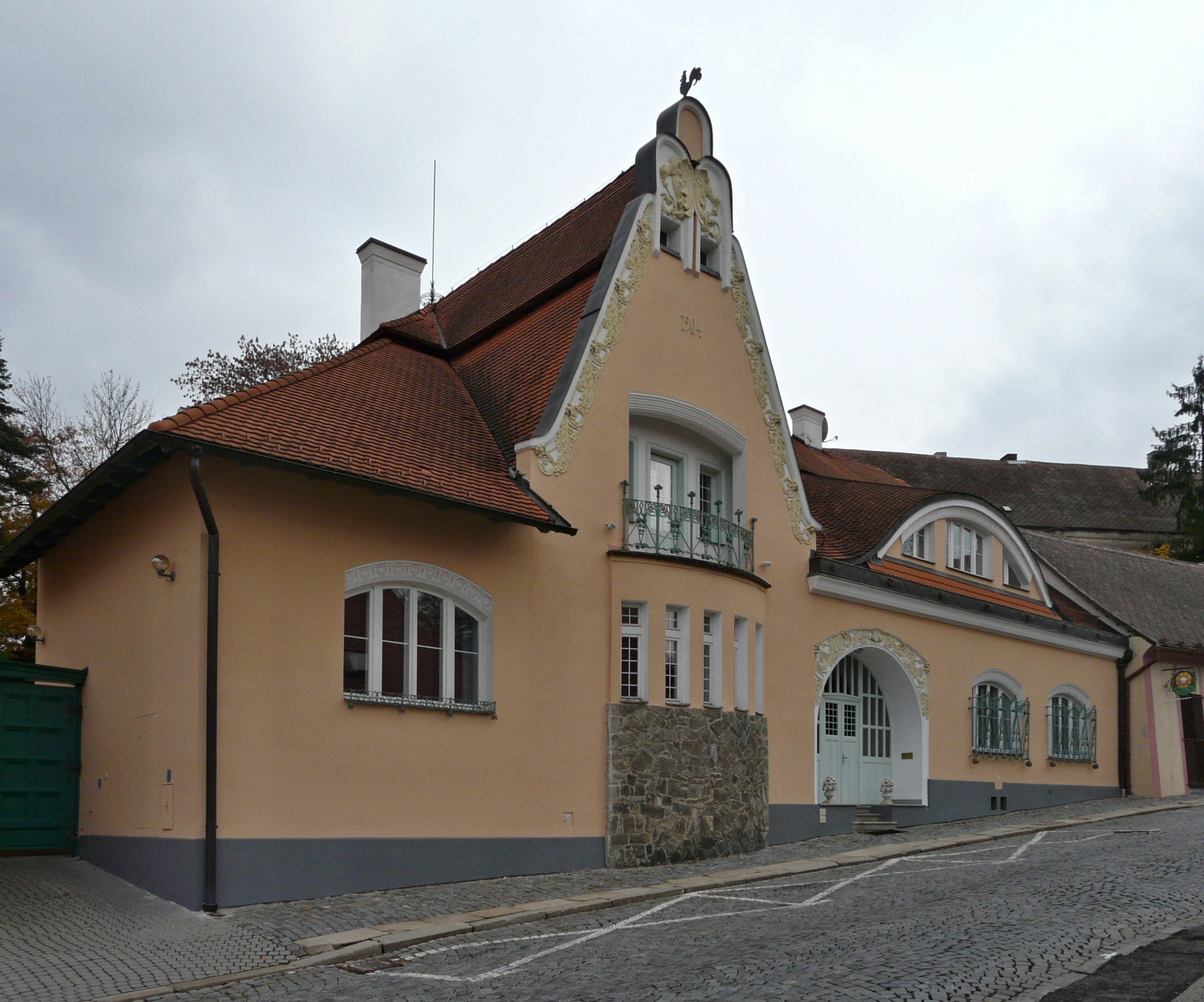 Otakar Novotný: Vila Edvarda Lederera, Jindřichův Hradec, Pražská 100.